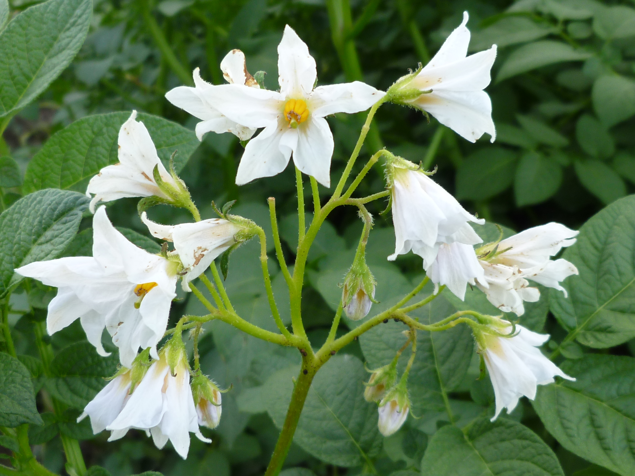 Kartoffelblüte im Juni 2016; Aufgenommen entlang des Donau-Radweges bei Reibersdorf im Landkreis Straubing-Bogen.